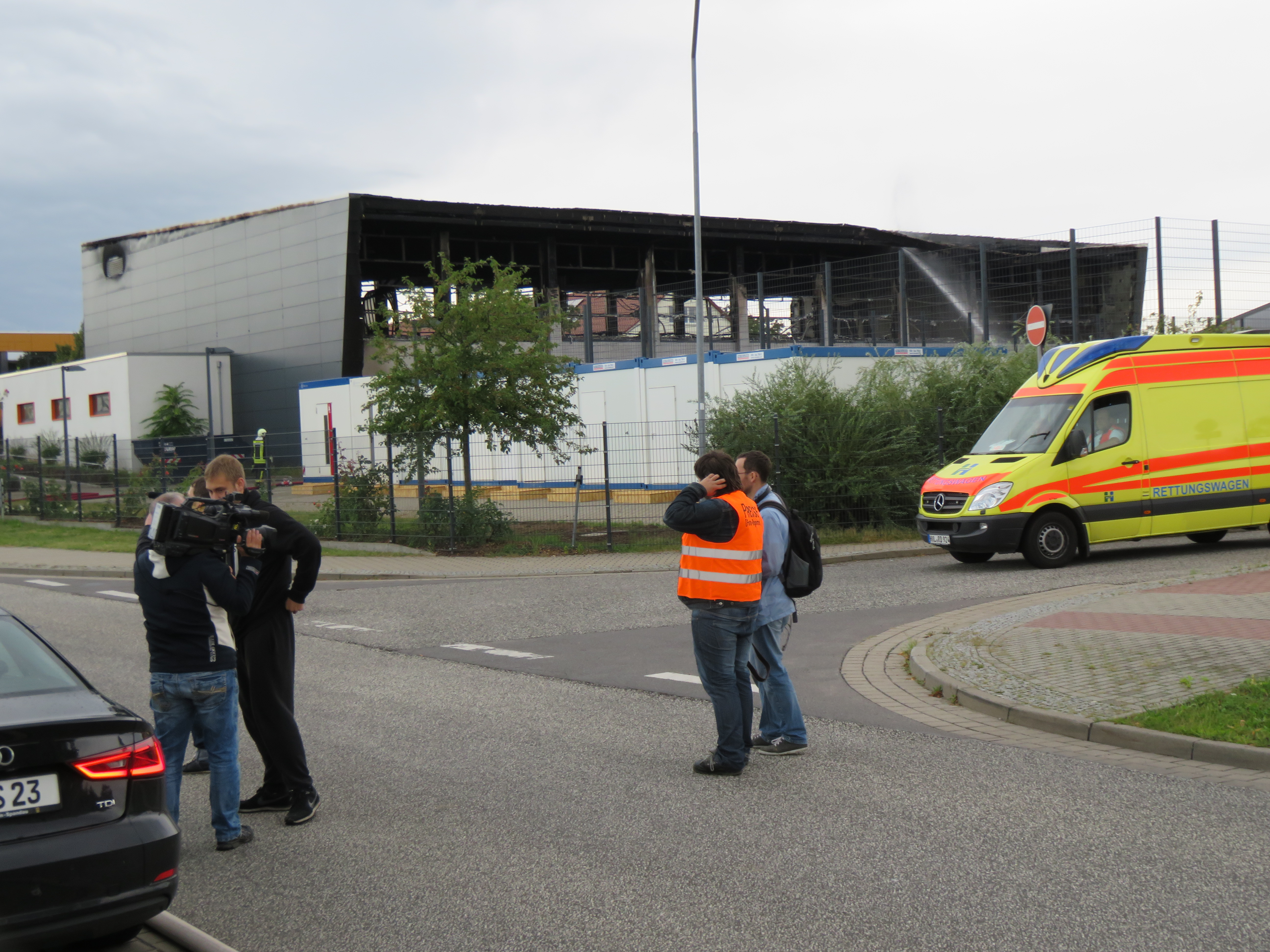 Nach dem Brandanschlag auf die geplante Flüchtlingsunterkunft in Nauen